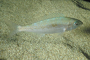 Picture of Spicara flexuosa